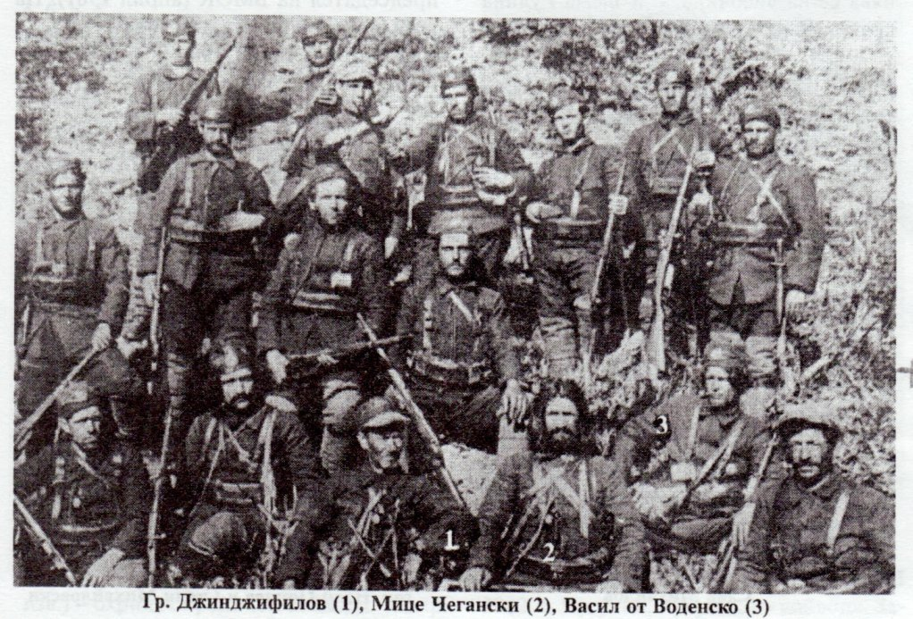 Григор Джинджифилов (1), Мице Чегански (2) и Васил от Воденско (3).